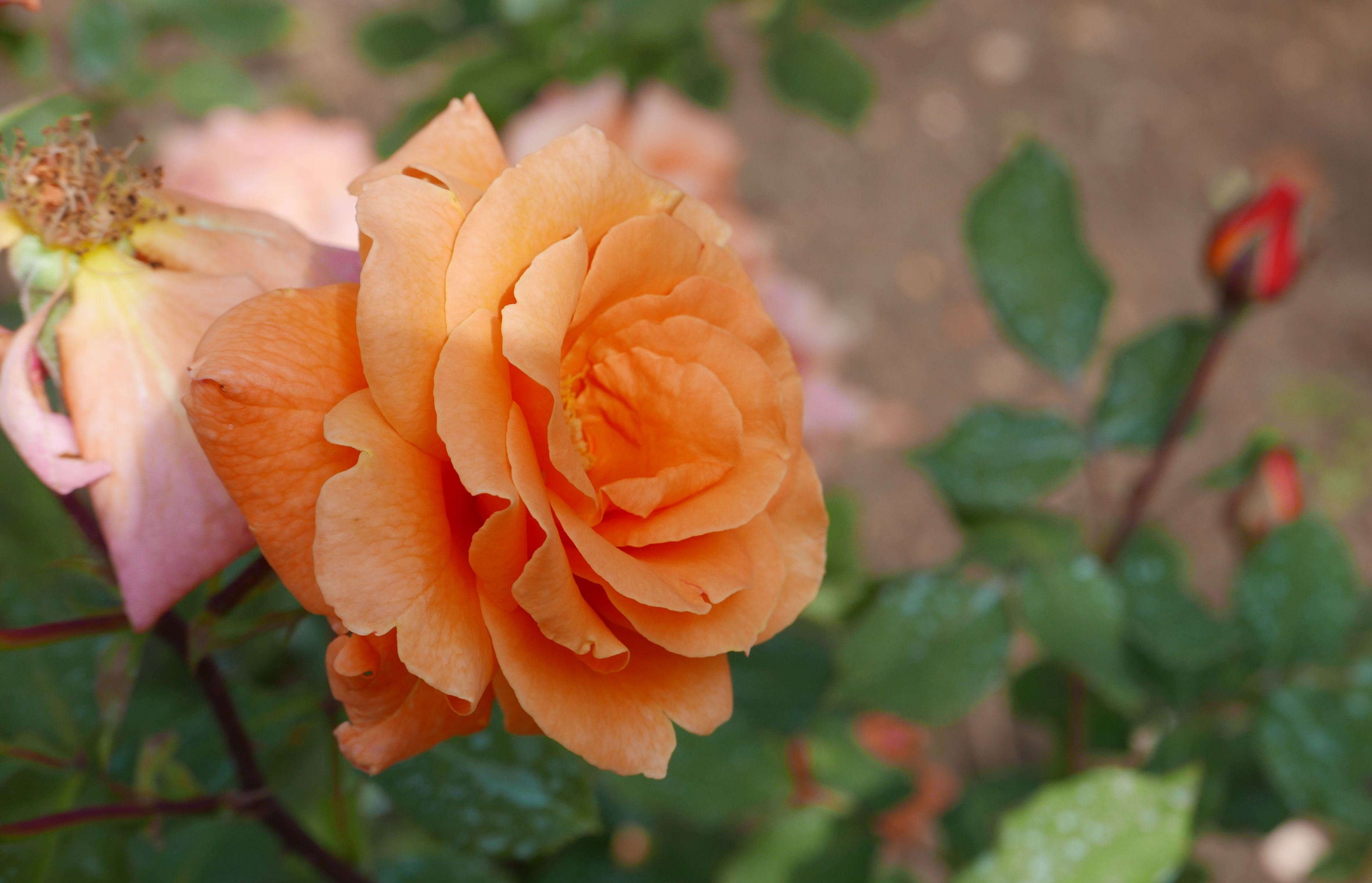 Rosa 'Joe Polowsky Friedensrose', orange Teehybride, Ewald Scholle 2007